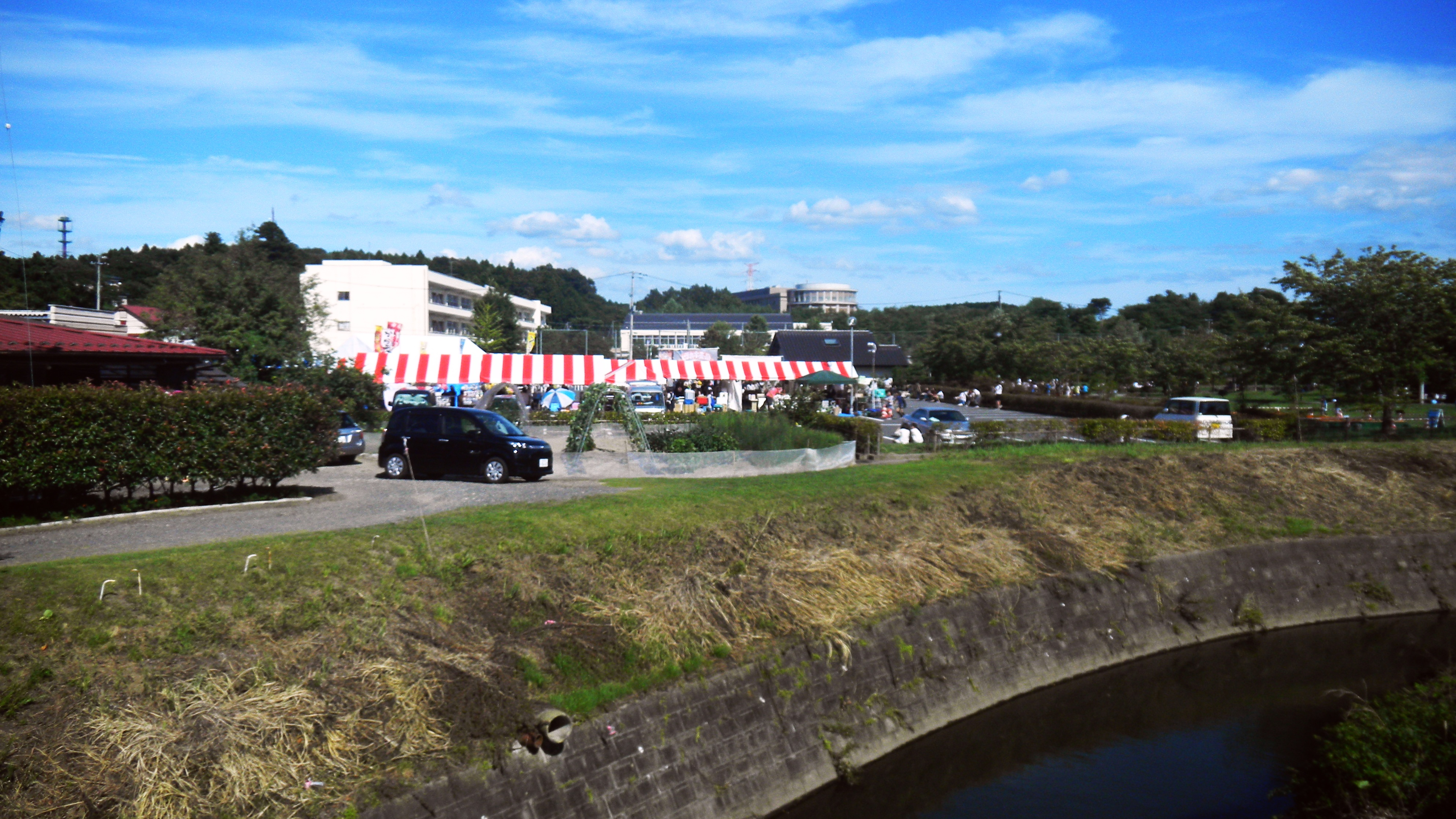 鳴瀬川水系の西川